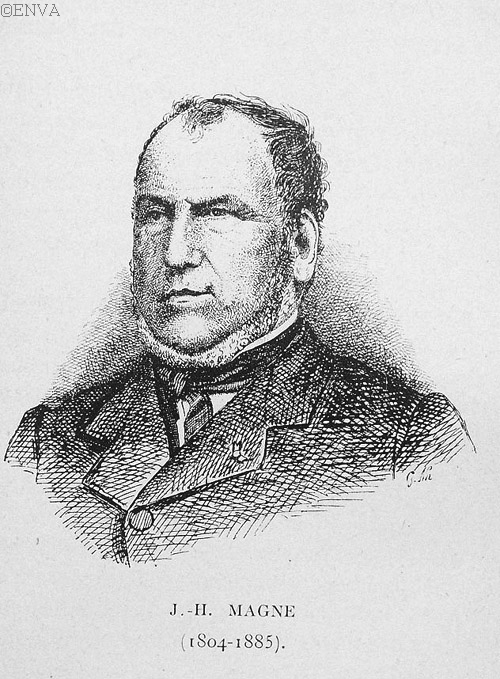 Jean-Henry Magne (1804-1885), professeur à l'École véérinaire de Lyon puis à celle d'Alfort, dessiné par Louis Georges Neumann